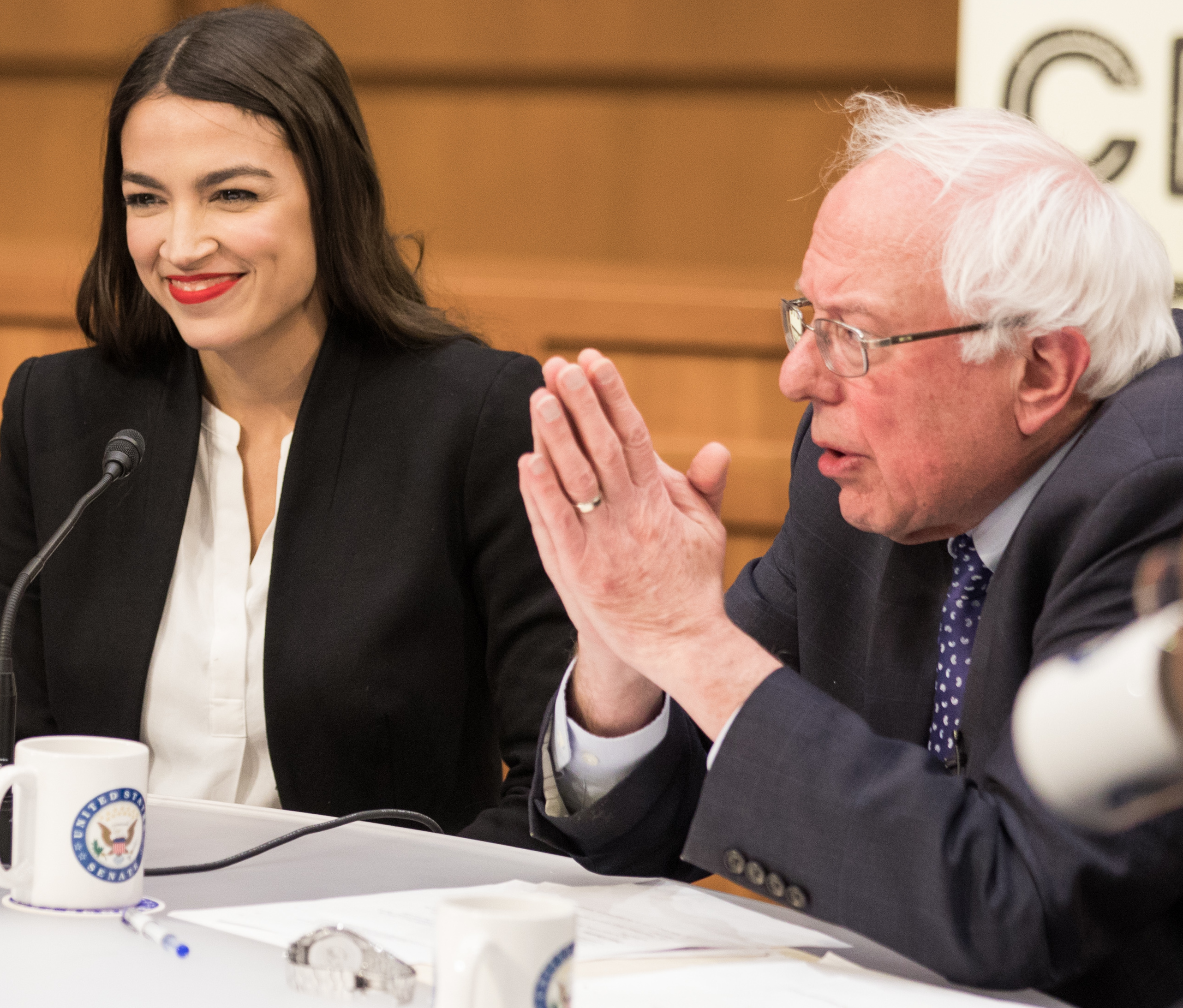 9H1A8449